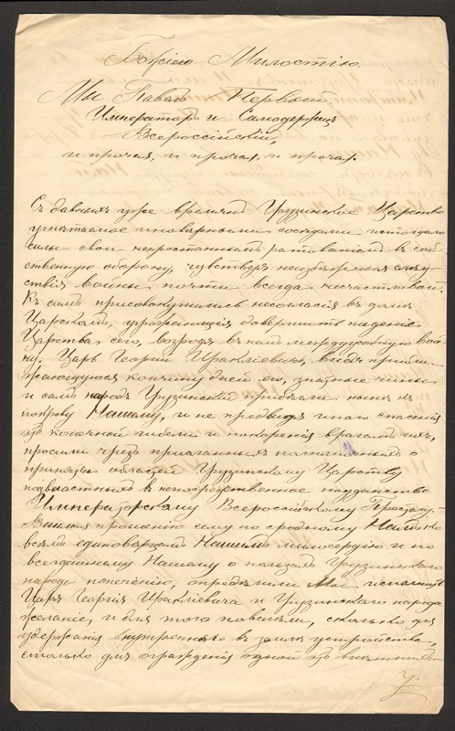 პავლე I-ის 1801 წლის 18 იანვრის მანიფესტი